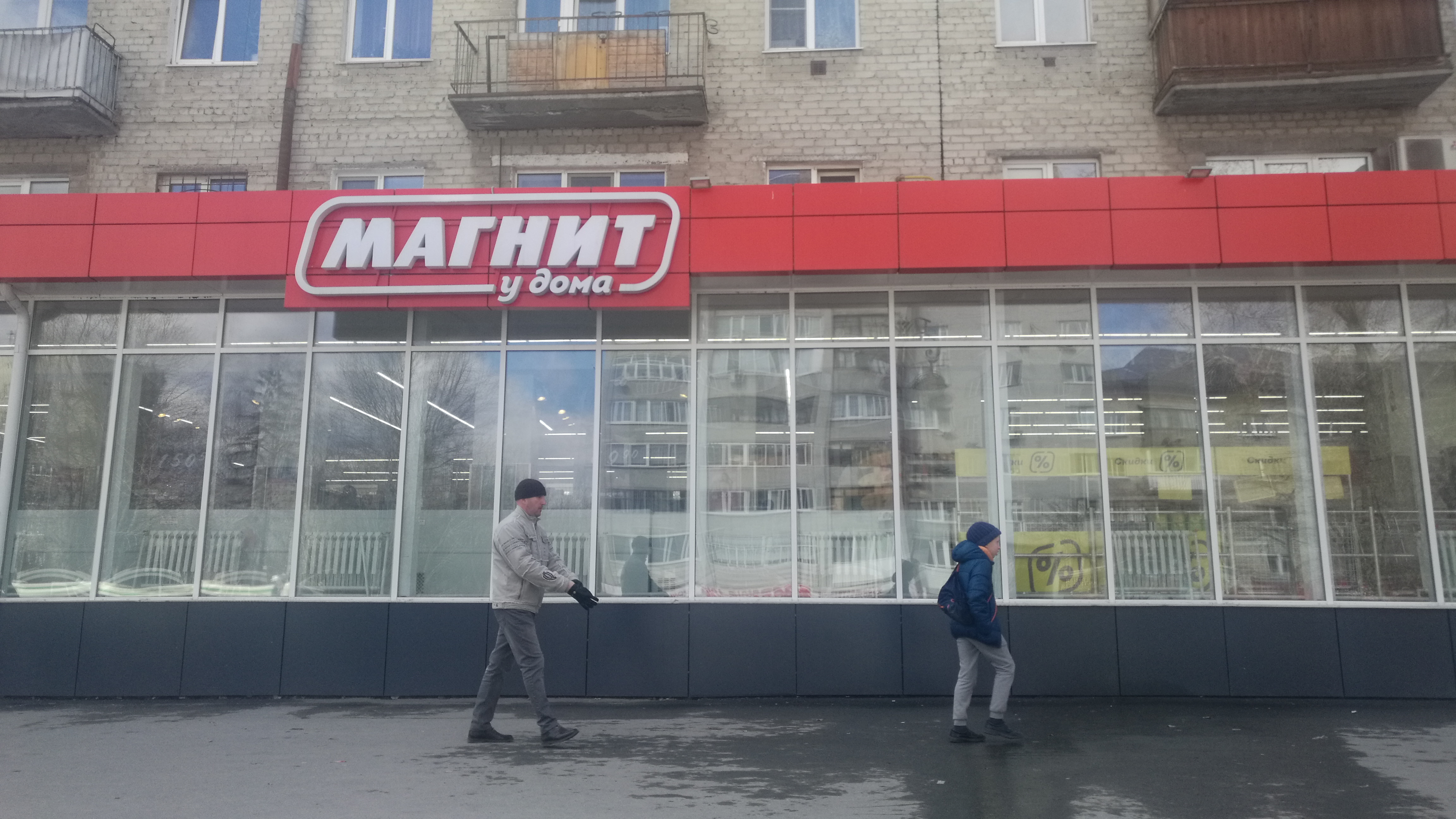 Strato Respubliko. Tjumeno, Rusio.